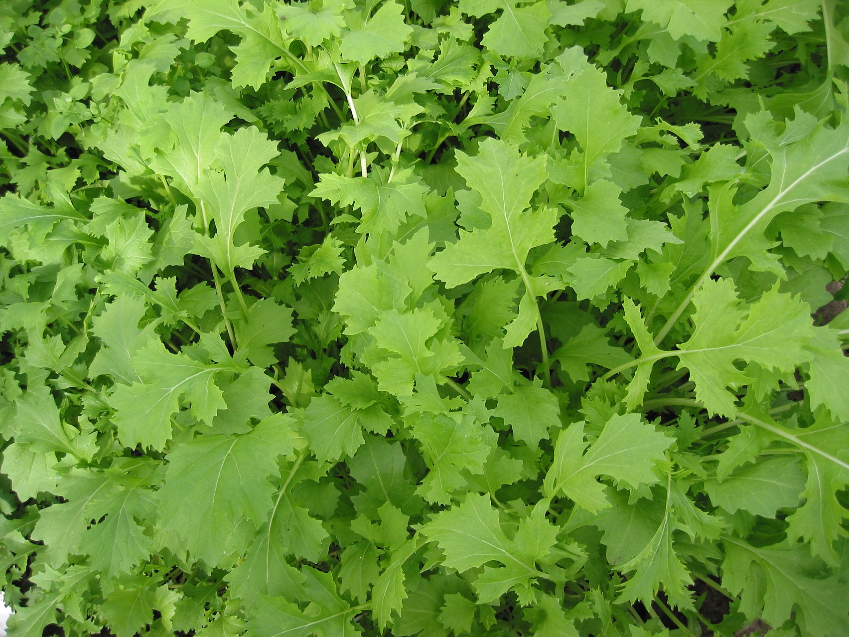 (Raapstelen) Brassica campestris greens